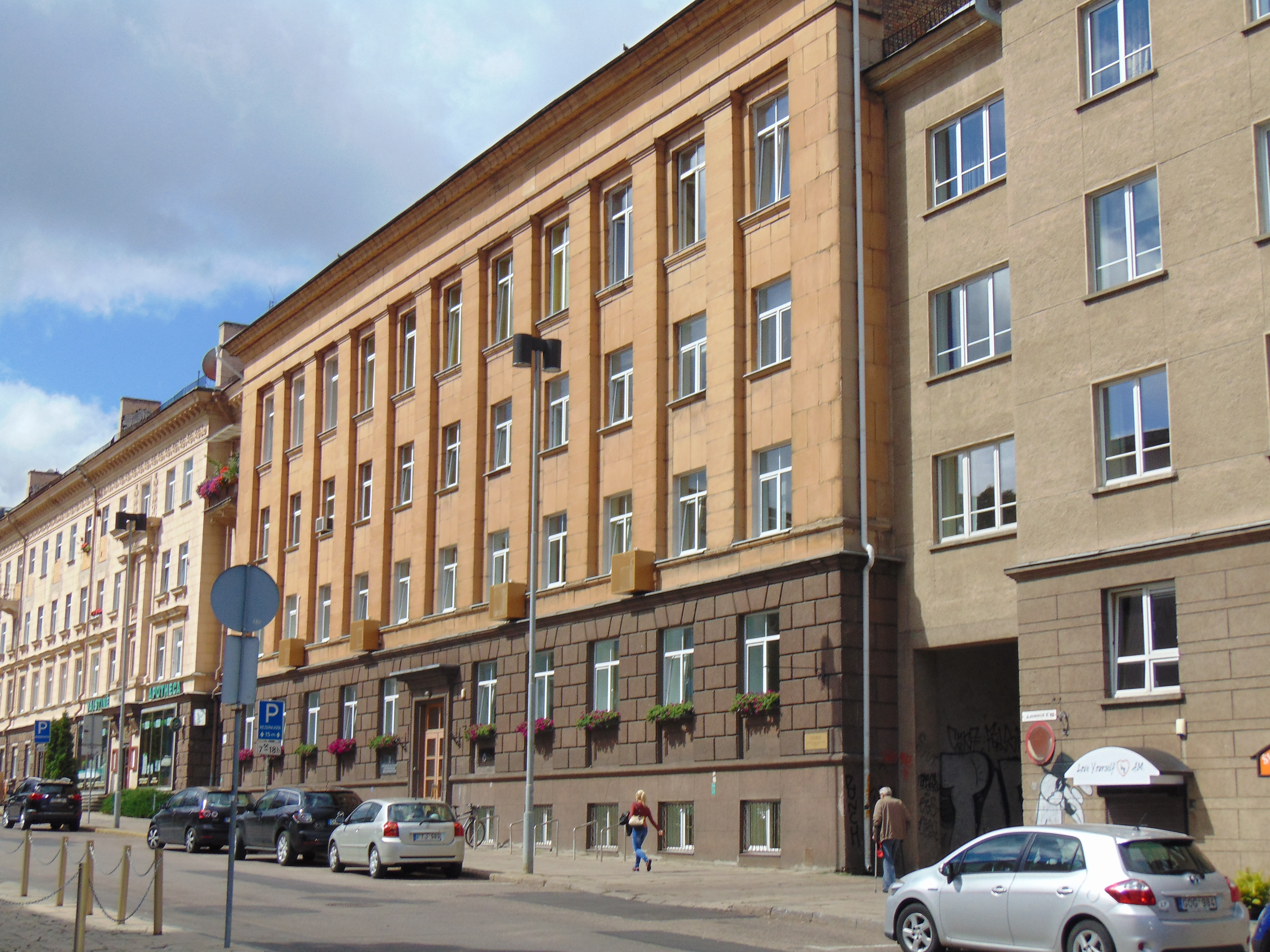 Buvusi Energetikos ministerijos buveinė